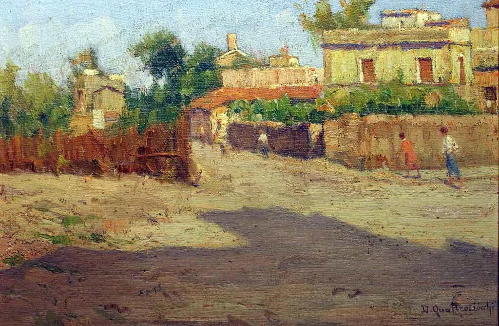 Tra le vie di Palermo, olio su tavola, 21,5 x 32 cm., firmato, coll. privata